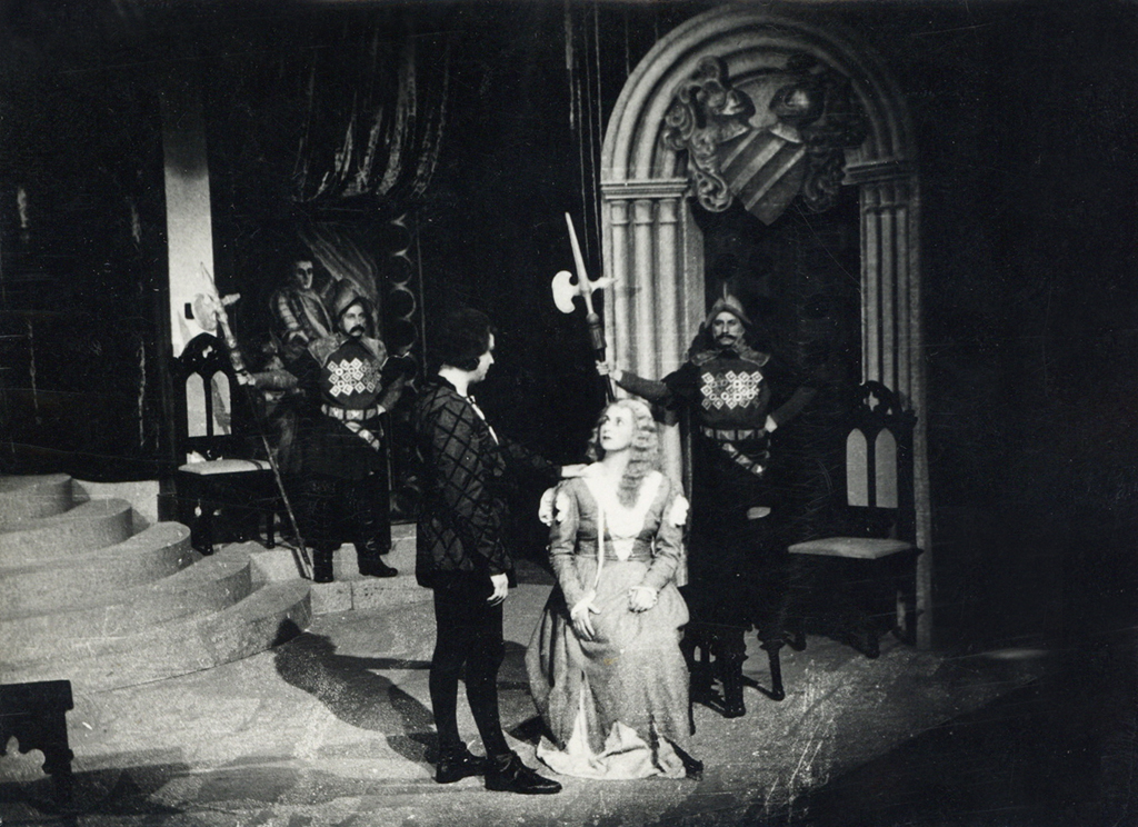 Bratko Kreft, Celjski grofje, Drama SNG v Ljubljani. Na fotografiji: v ospredju Stane Sever (Pravdač), Ančka Levar (Veronika).